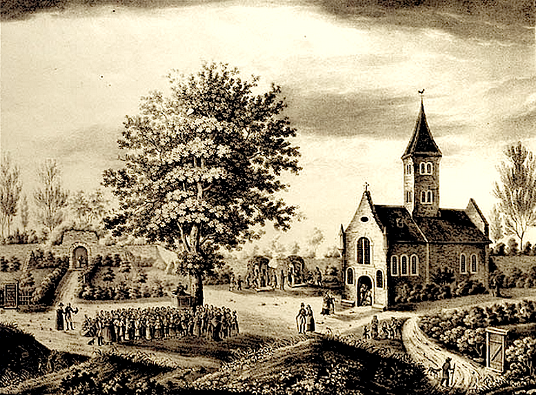 Часовня св. Аурея в Цальбахе, - бывшем районе Майнца. Разрушена в 1793 году. Литография 1842 года.